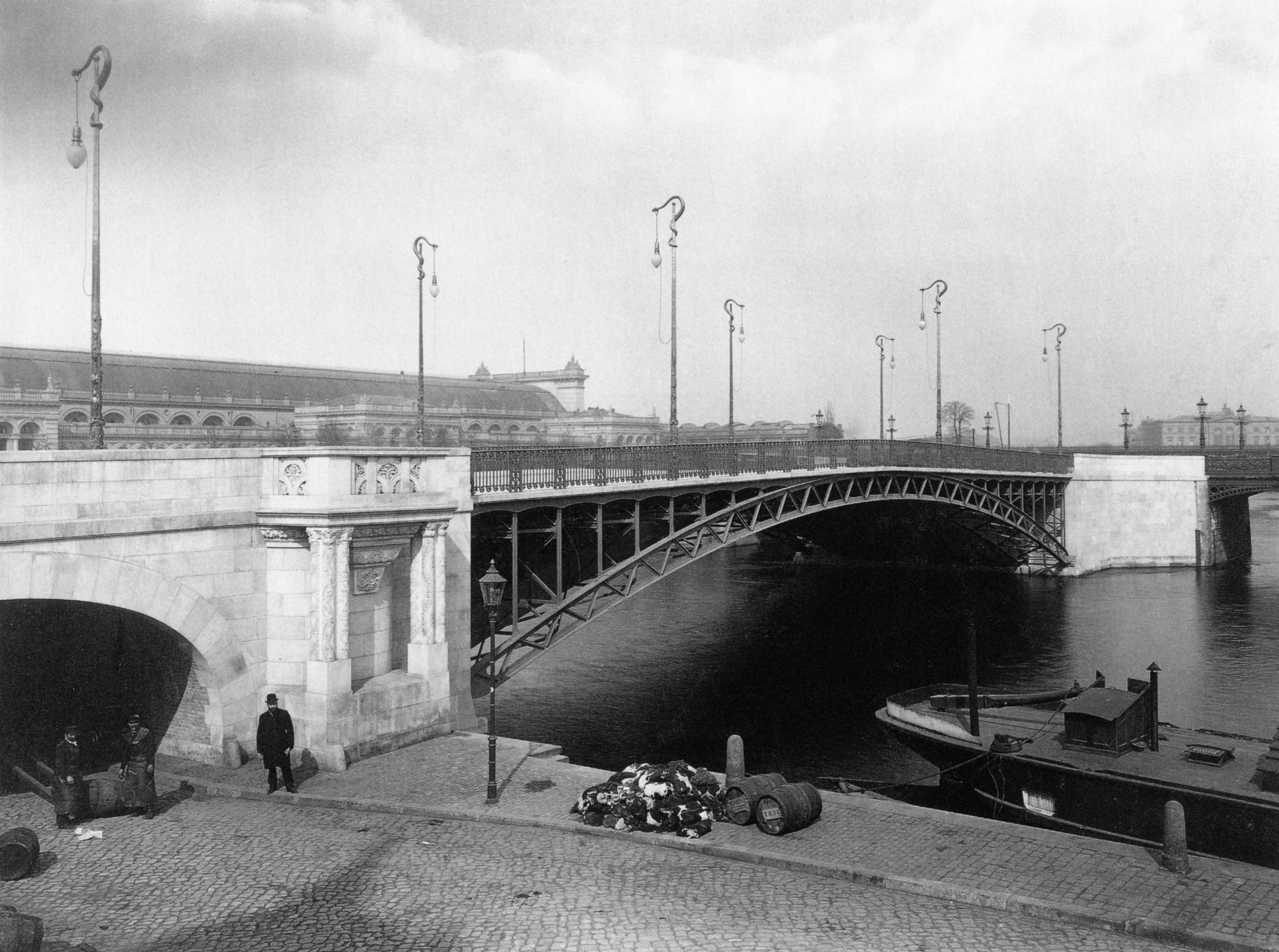 Alsenbrücke in Berlin